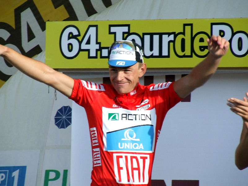 Piąty etap 64. Tour de Pologne: Września - Świdnica Licensing: This image or multimedia was created by Bartosz Senderek. The image or audio is licensed under CC-BY license. Attribution to me is required. Licencja: Ten obrazek lub plik multimedialny został stworzony przez Barotsza Senderka. Został on udostępniony na licencji CC-BY. Informacja o moim autorstwie jest wymagana. "I want to use the image/multimedia. How can I do that?" You can use this image/multimedia freely for any purpose, including commercial use, provided that you license it under the above license. My suggestion is to use text shown below: If you use the image I would appreciate it if you would let me know on my talk page, but this is not required as long as you follow the above license. "Chcę użyć tego pliku. Jak mogę to zrobić?" Możesz używać tej grafiki/multimediów darmowo w każdym celu, włączając użycie komercyjne, udostępniając go dalej na powyższej licencji. Jeśli zdecydujesz się na publikację zdjęcia mojego autorstwa obowiązkowo podpisz go w sposób podany w sekcji "Licensing text". Jeżeli użyłeś mojego pliku możesz powiadomić mnie o tym na mojej stronie dyskusji, lecz nie jest to wymagane, dopóki trzymasz się powyższej licencji.